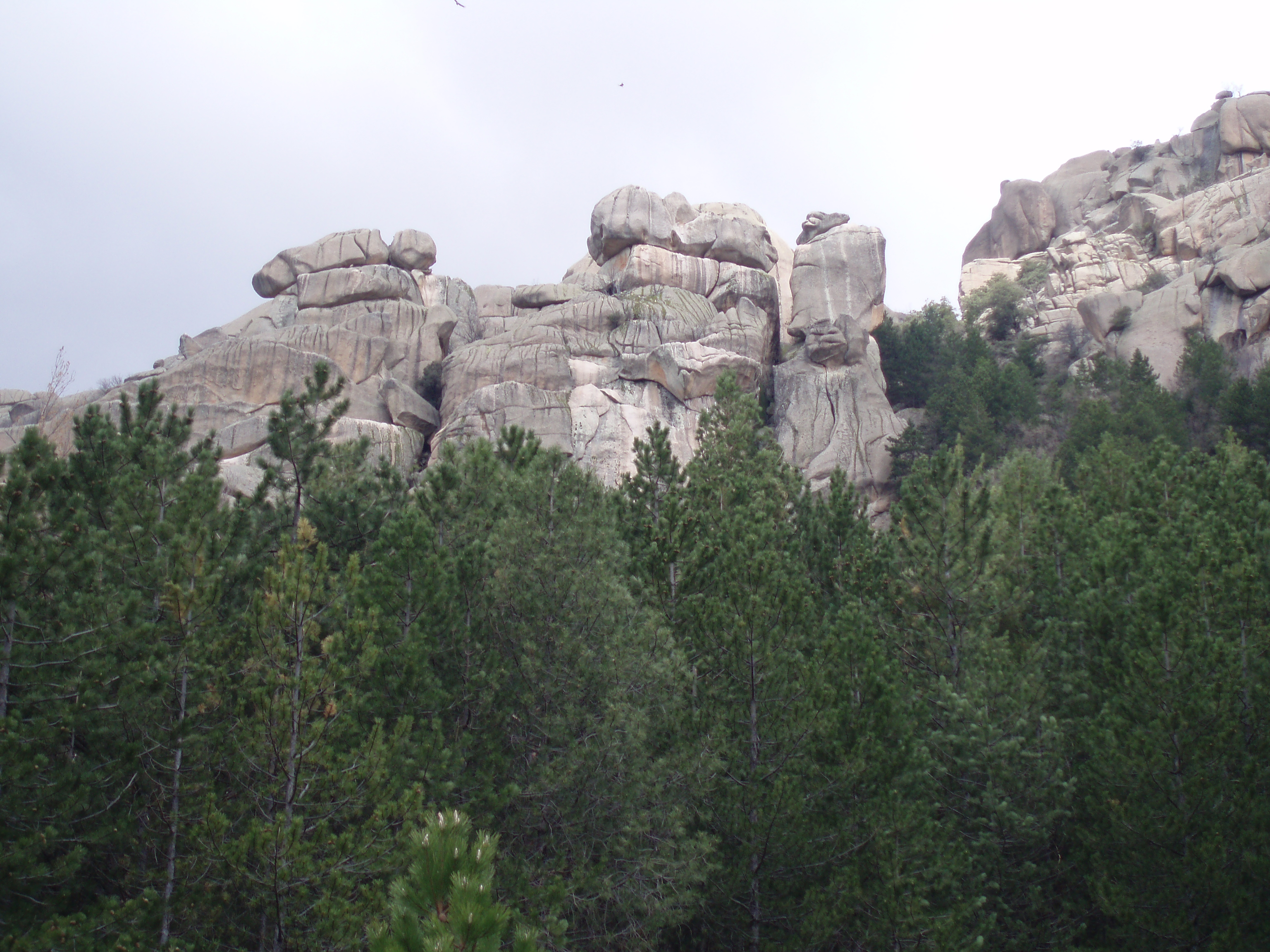 Riscos de granito en La Pedriza Posterior (Sierra de Guadarrama, España).